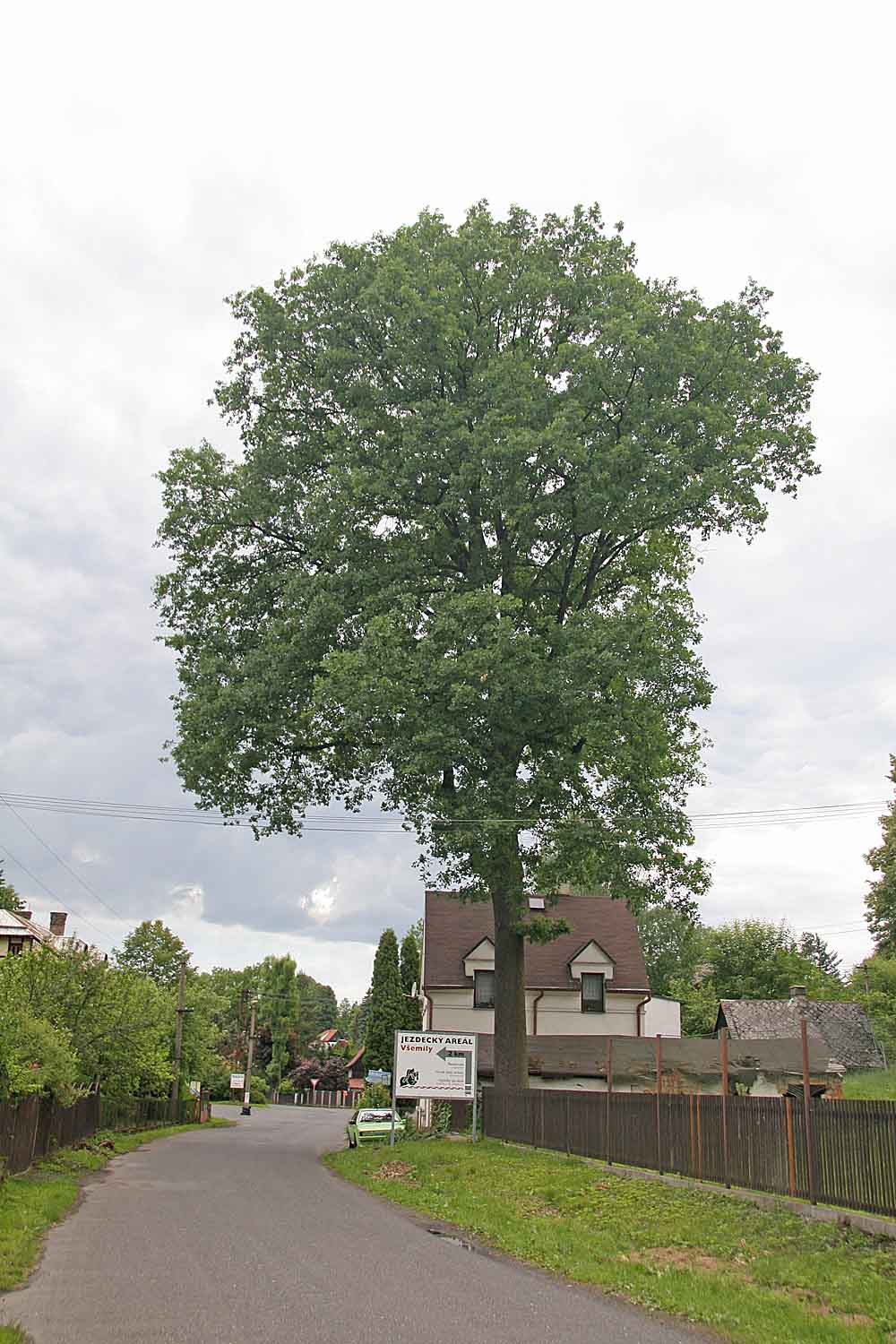 Památný dub letní v obci Jetřichovice, okres Děčín